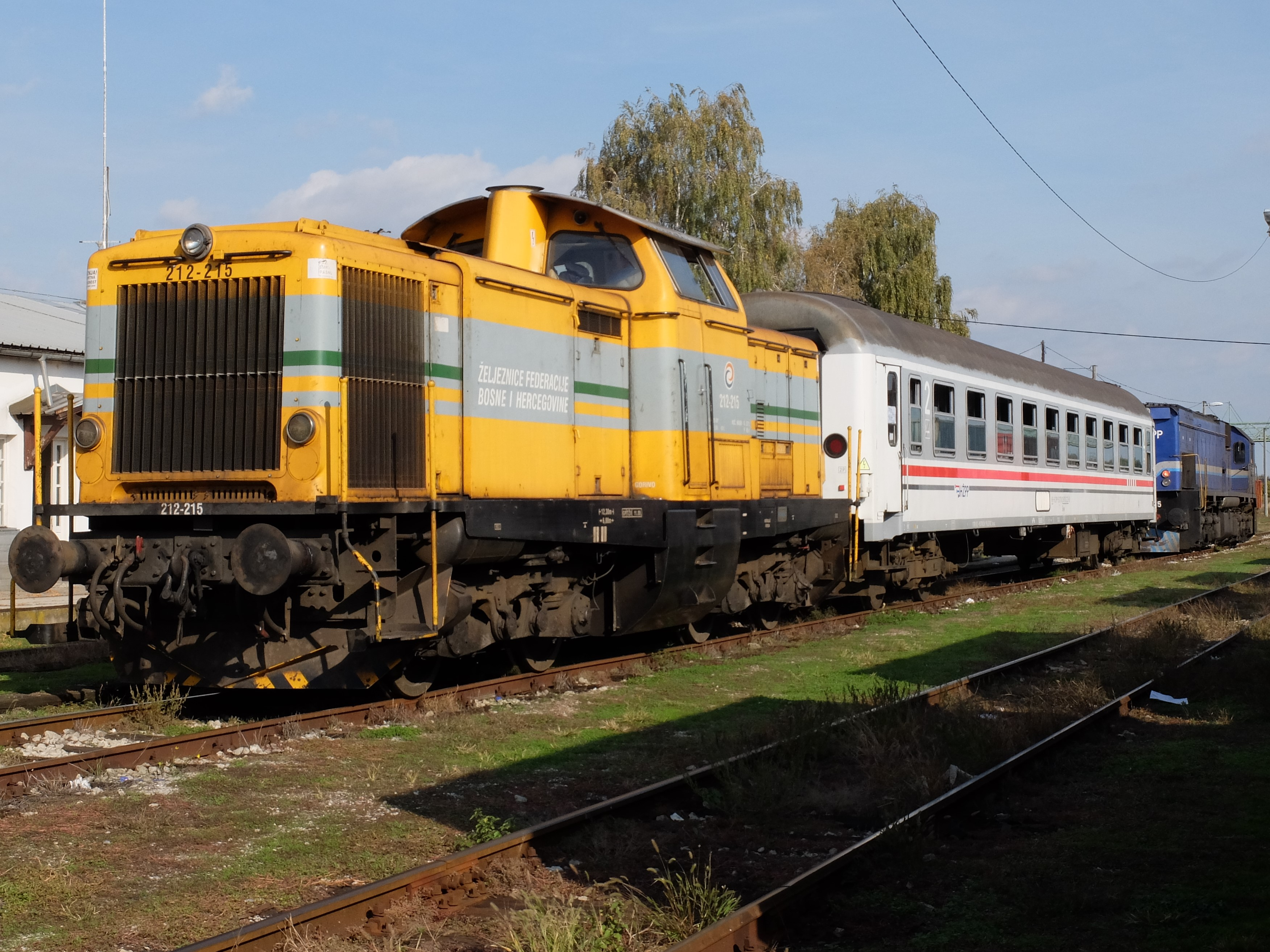 ŽFBH 212 215 mit Zug für die DGEG im Grenzbahnhof Brčko.